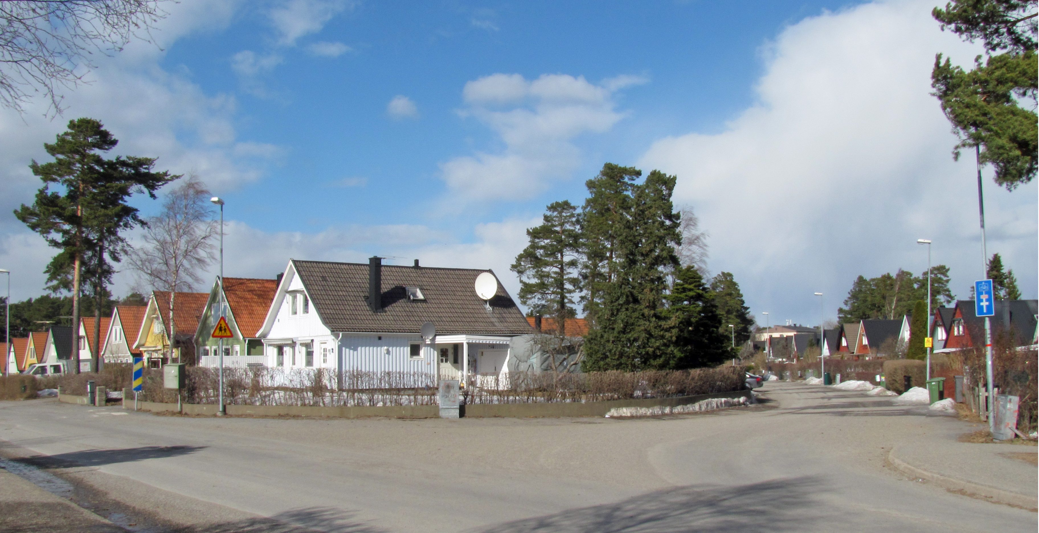 Vendelsömalm, korsningen Henriksbergsvägen/Lorensbergsvägen